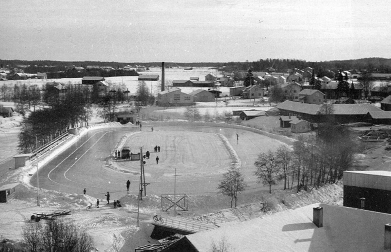 Saarikenttä Vimpelissä vuonna 1963.